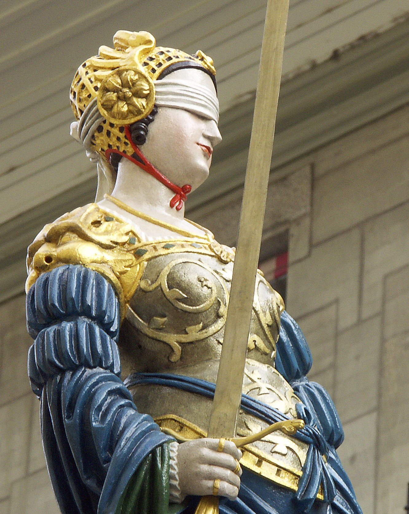 Gerechtigkeitsbrunnen